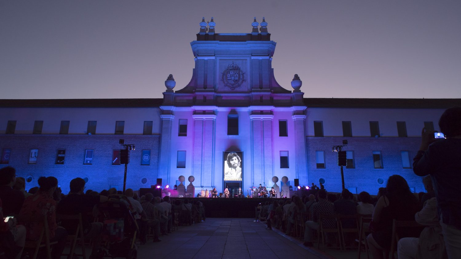 Lleno absoluto en el homenaje al mítico cantaor gitano José Monje Cruz, más conocido como Camarón de la Isla (1950 – 1992), celebrado ayer domingo 2 de julio. El calor del público, de los familiares y de los amigos del artista convirtió el patio central del Conde Duque en una hermosa cita para recordar el aniversario de su desaparición. Cante flamenco a raudales de la mano de sus hijos, el guitarrista Luis Monge y las cantaoras Gema y Rocío Monge, en un concierto creado y dirigido por Jorge Pardo, saxofonista y flautista madrileño, Premio Nacional de Músicas Actuales en 2015.